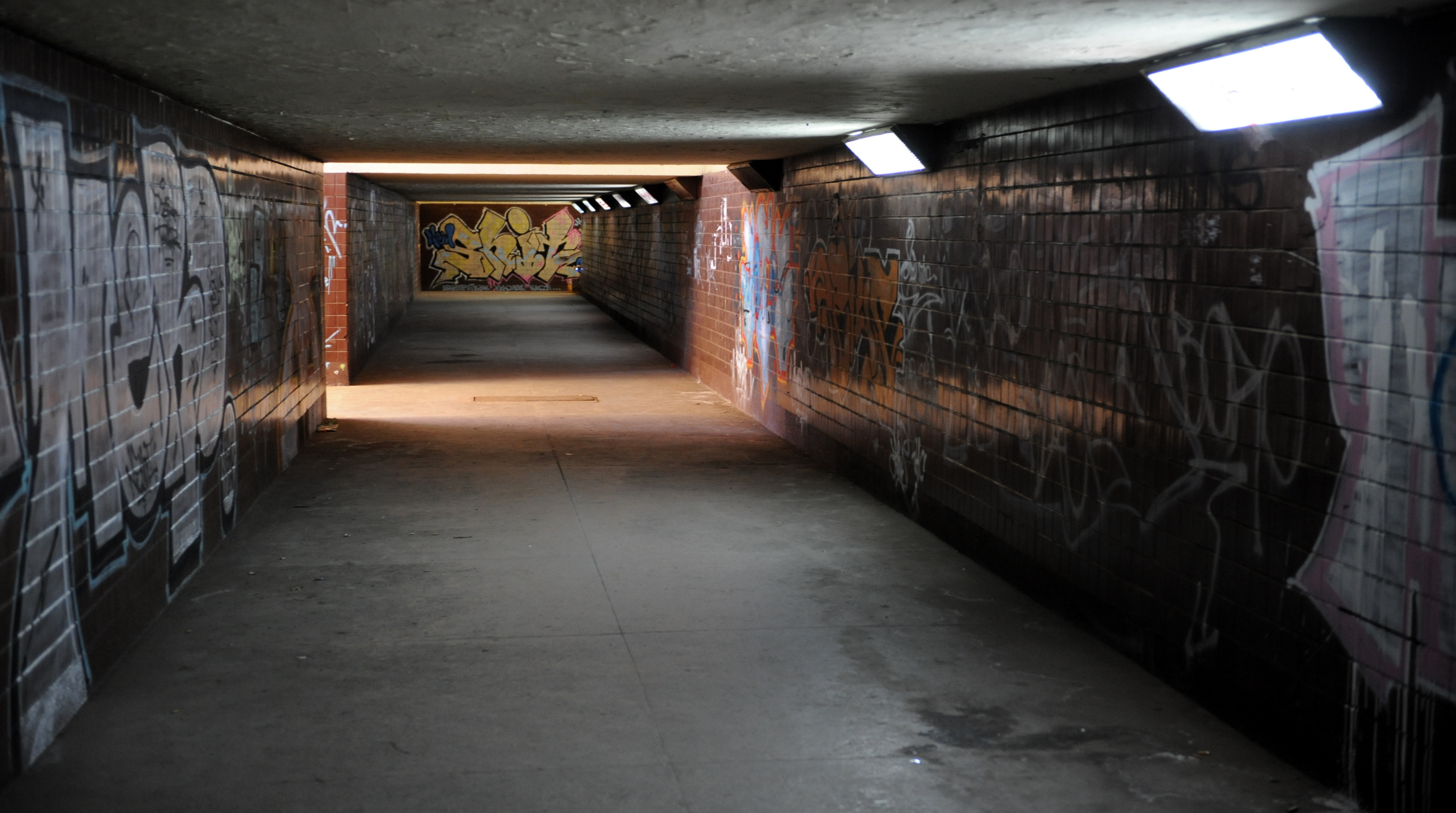 Przejście podziemne na stacji kolejowej Warszawa Wawer.